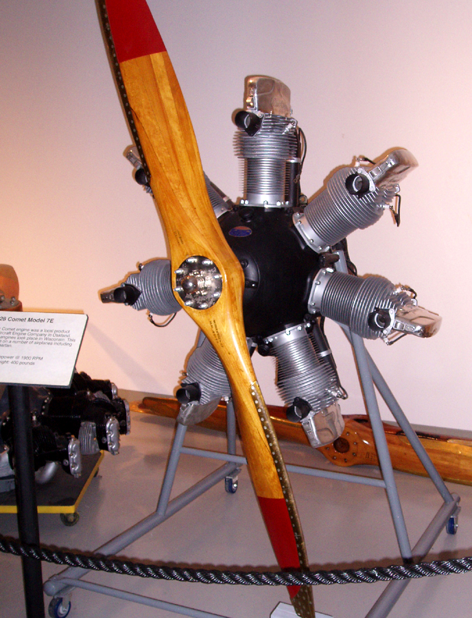 Comet 7E